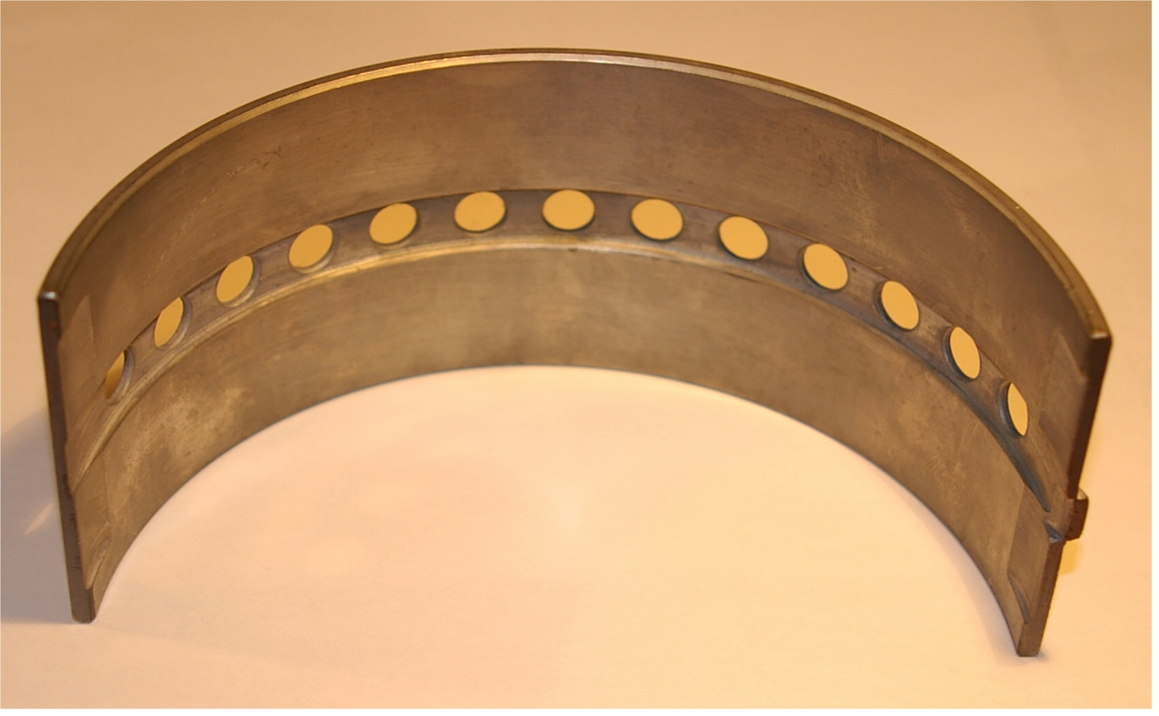 Gleitlager eines SChiffsdiesel-Motors